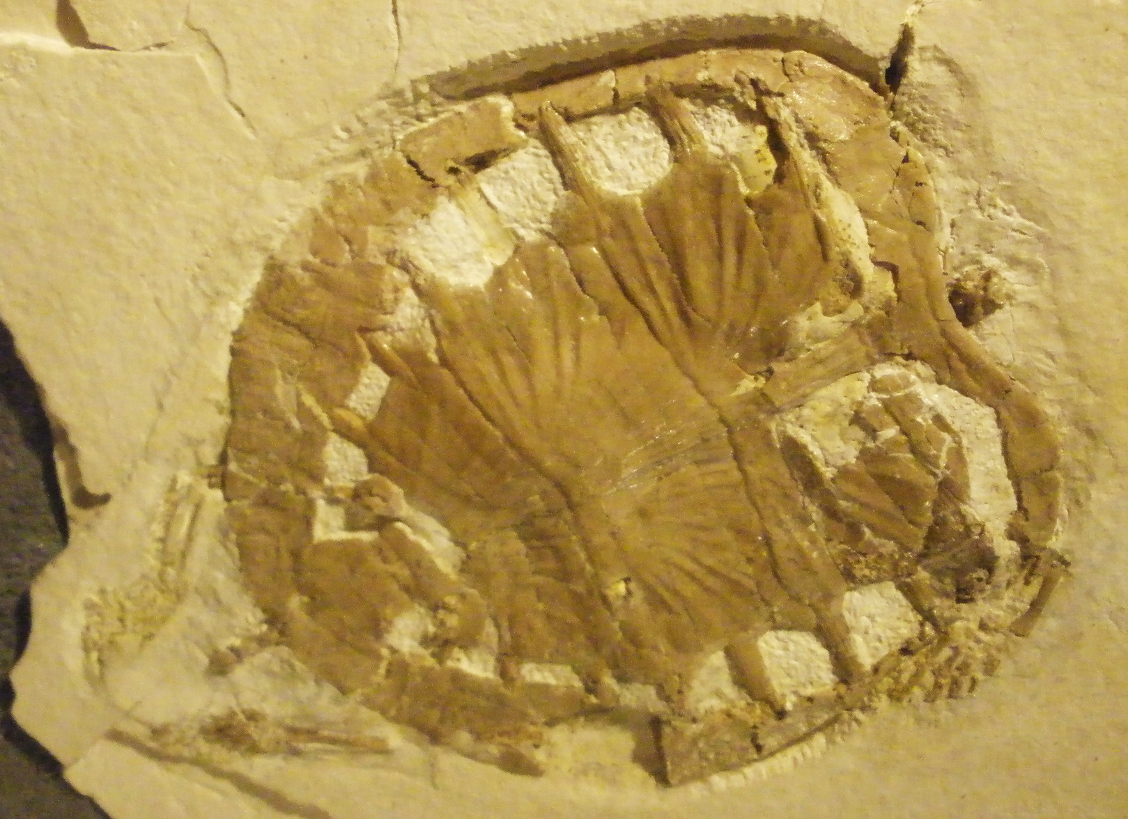 Fossil of Plesiochelys, an extinct turtle- Took the photo at Senckenberg Museum of Frankfurt